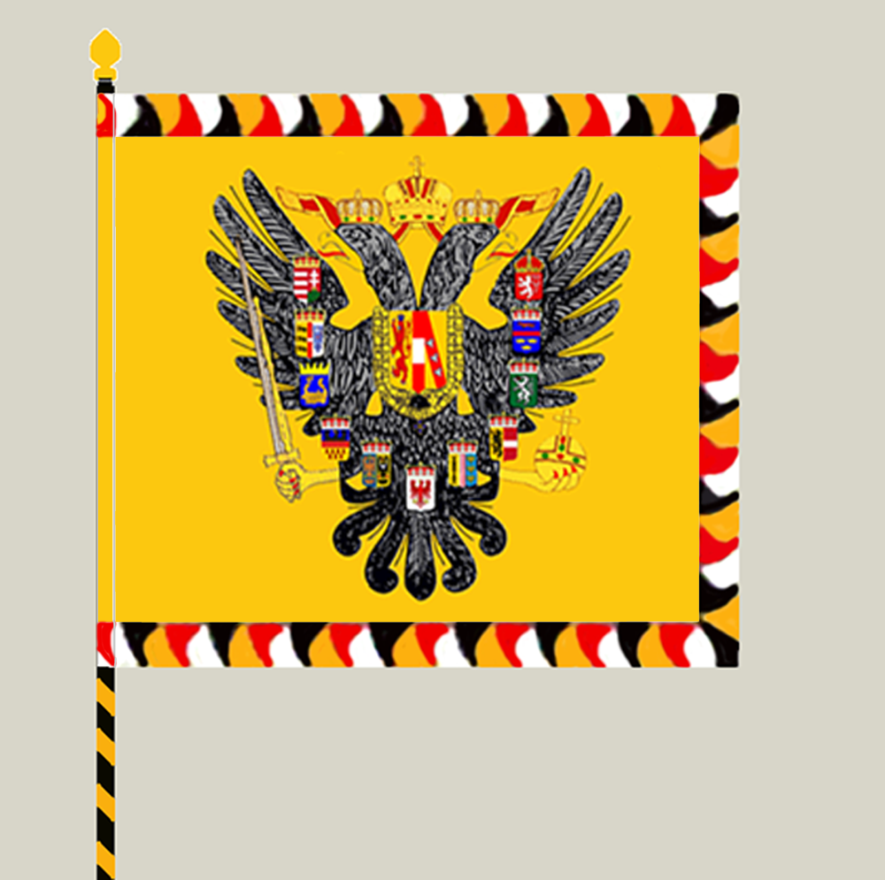 k.u.k. Regimentsfahne Vorder- und Rückseite (nur die Infanterie-Regimenter Nr. 2, Nr. 4, Nr. 39, Nr. 41 und Nr. 57